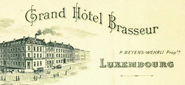 Luxembourg, ancien Hôtel Brasseur